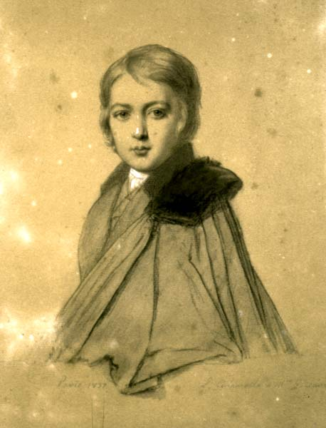 Maurice Dudevant, fils de George Sand, dessin